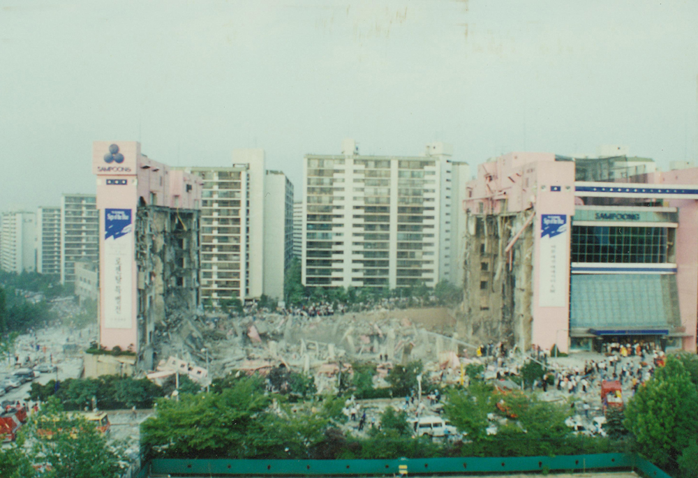 서울특별시 소방재난본부 소장 사진. photos of Seoul Metropolitan Fire & Disaster Headquarters. 이 파일은 크리에이티브 커먼즈 저작자표시-동일조건변경허락 4.0 국제 라이선스로 배포됩니다. 단 누구인지 구별 가능한 특정 인물이 사진에 포함되어 있을 경우 사용 전에 서울특별시 소방재난본부 및 해당 인물의 승인을 받으셔야합니다. 감사합니다. evidence of permission